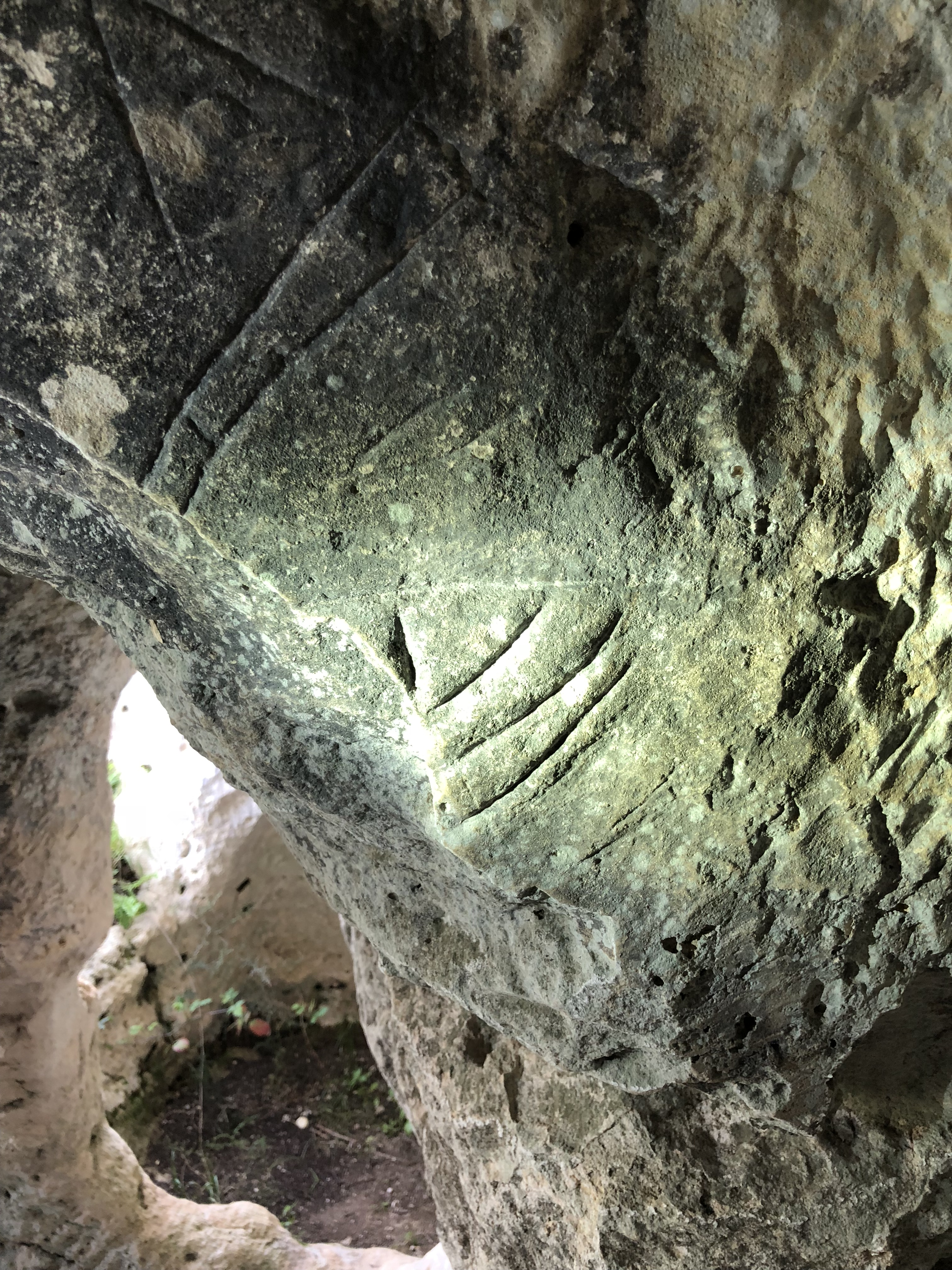 Graffiti dell'ipogeo